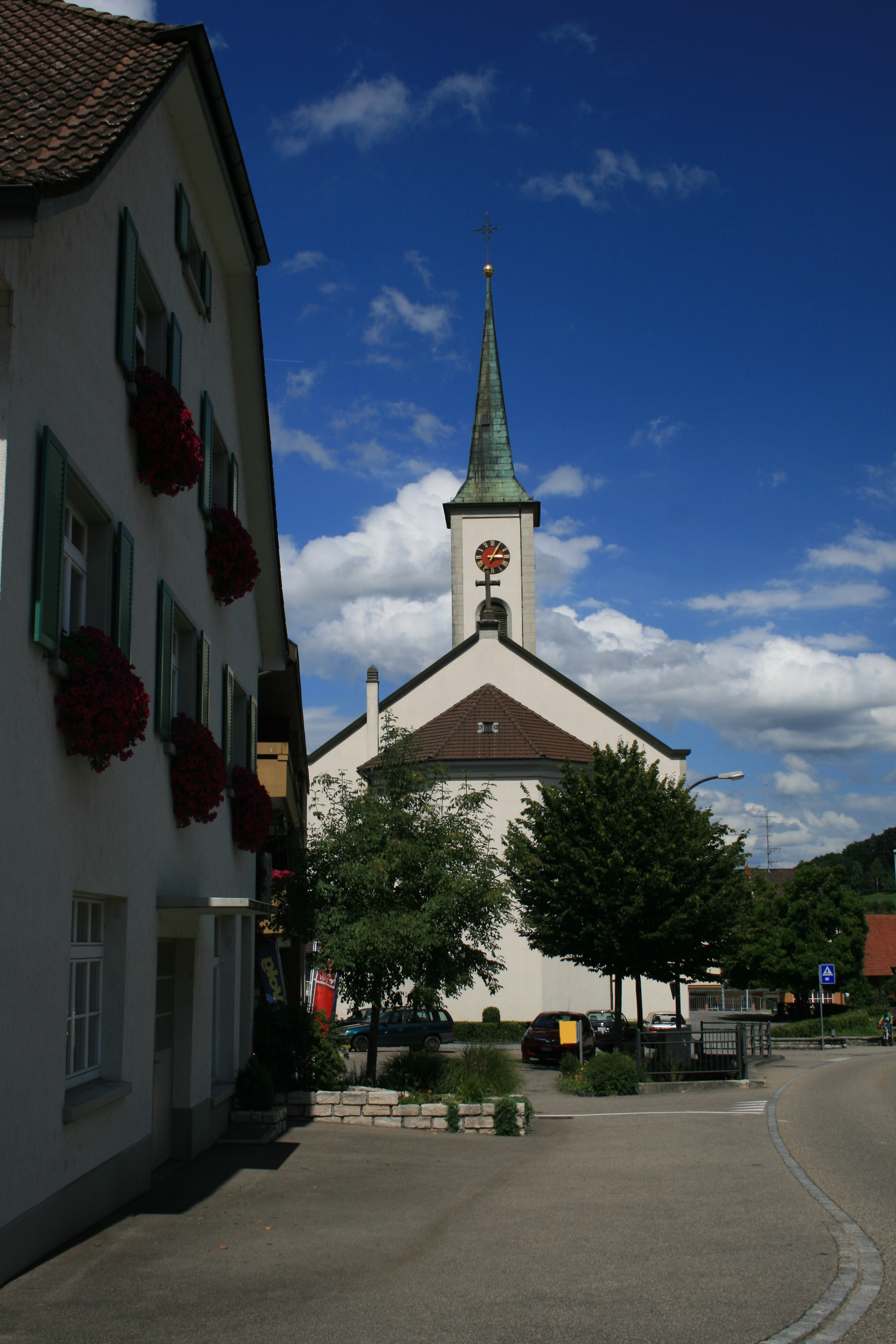 Eiken, Aargau